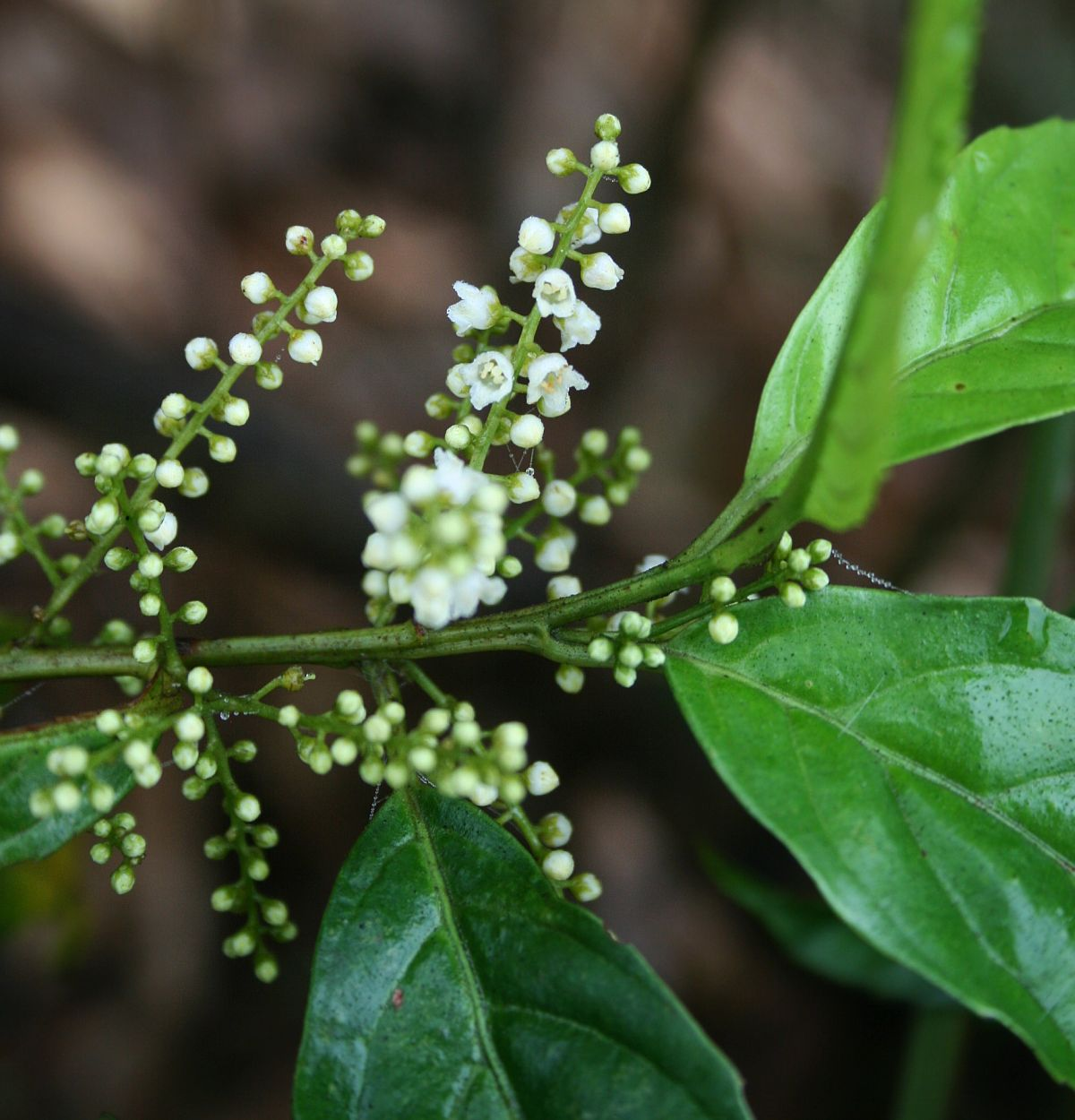 Maesa montana, Primelgewächse (Primulaceae), Maesoideae - Vietnam/Việt Nam: Phìn Hồ N Sìn Hồ (Prov. Lai Châu)